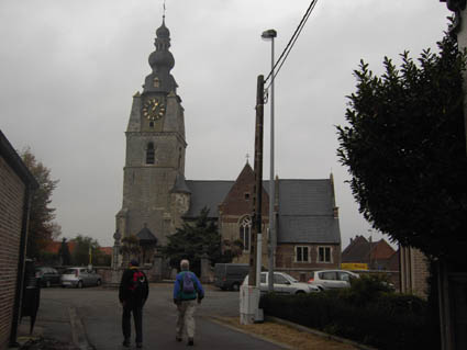 dorp van Mespelare